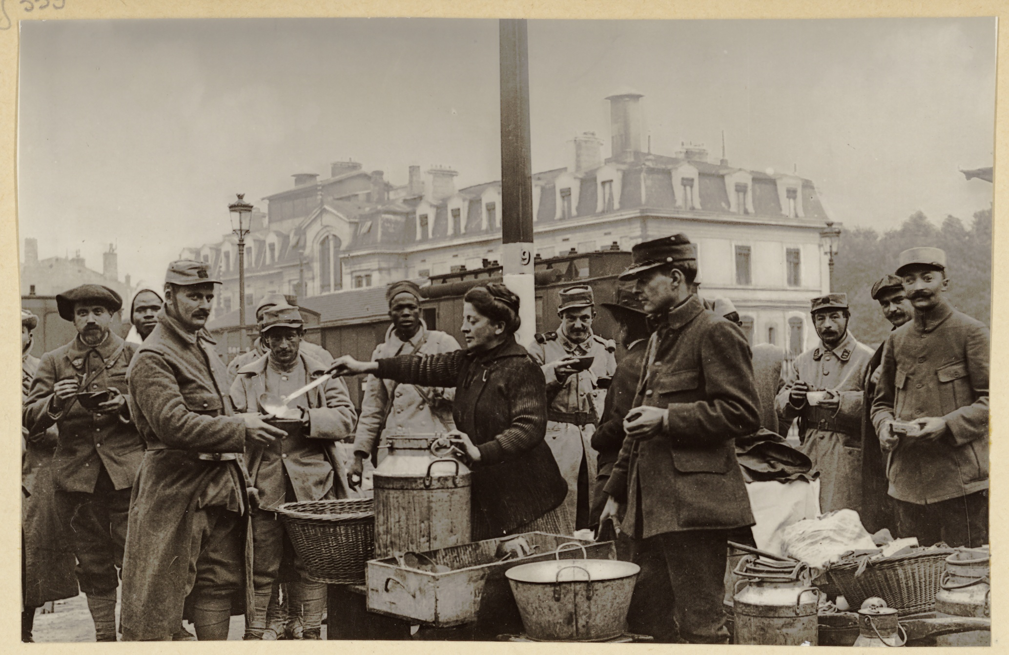 Clotilde Bizolon dite la « maman de poilus » distribue des rations de soupe aux soldats dans le secteur de Prrache à Lyon dans le 2e arrondissement lors de la 1ère Guerre Mondiale.